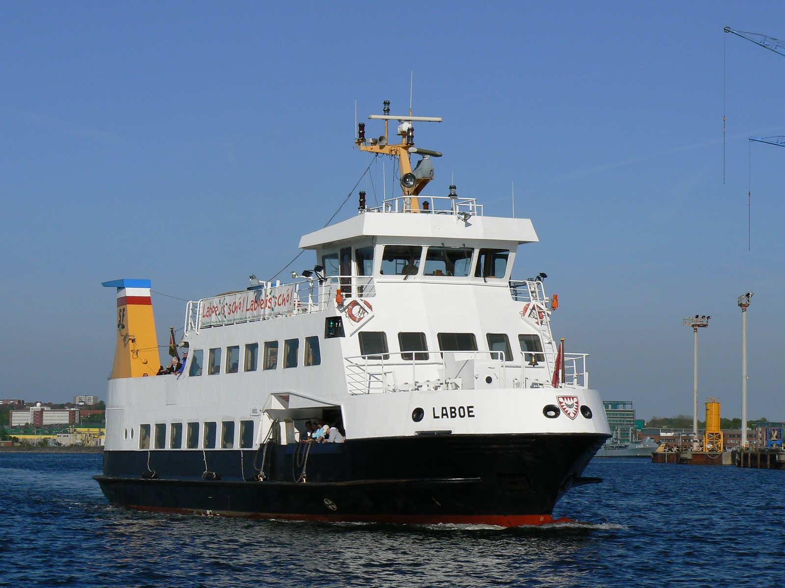 Fahrgastschiff Laboe der Schlepp- und Fährgesellschaft Kiel. IMO Number: 8400086 1984 Schiffswerft Lindenau, Kiel Yard number S215 Length: 32.90 m Beam: 7.90 m Depth: 2.20 m GT: 266 TDW: 50 Main engine: 1 MWM diesel 250 kW Speed: 11.5 kn MMSI Number: 211354870 Callsign: DJNM